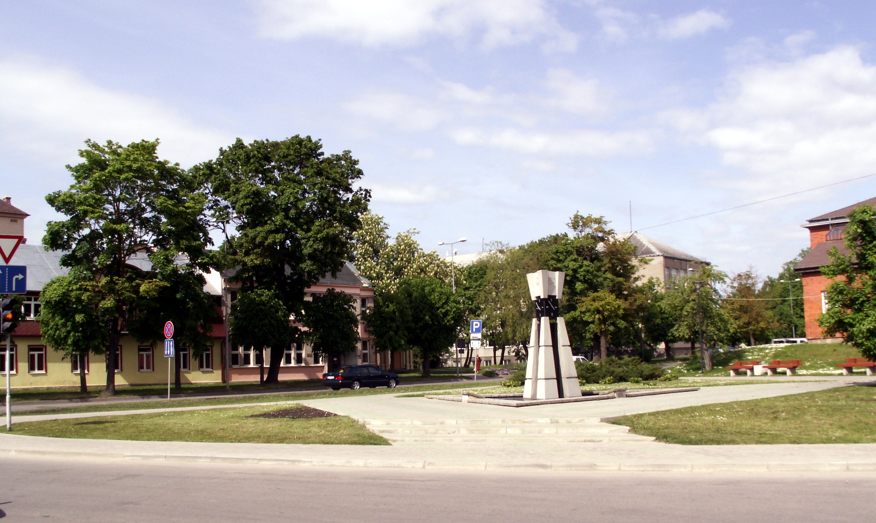 Dobele, Latvija, center